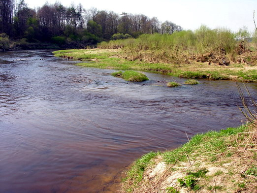 Deš. pusėje Vadakstis įteka į Ventą Fotografavo: Algirdas, 2006 m. gegužės 4 d.